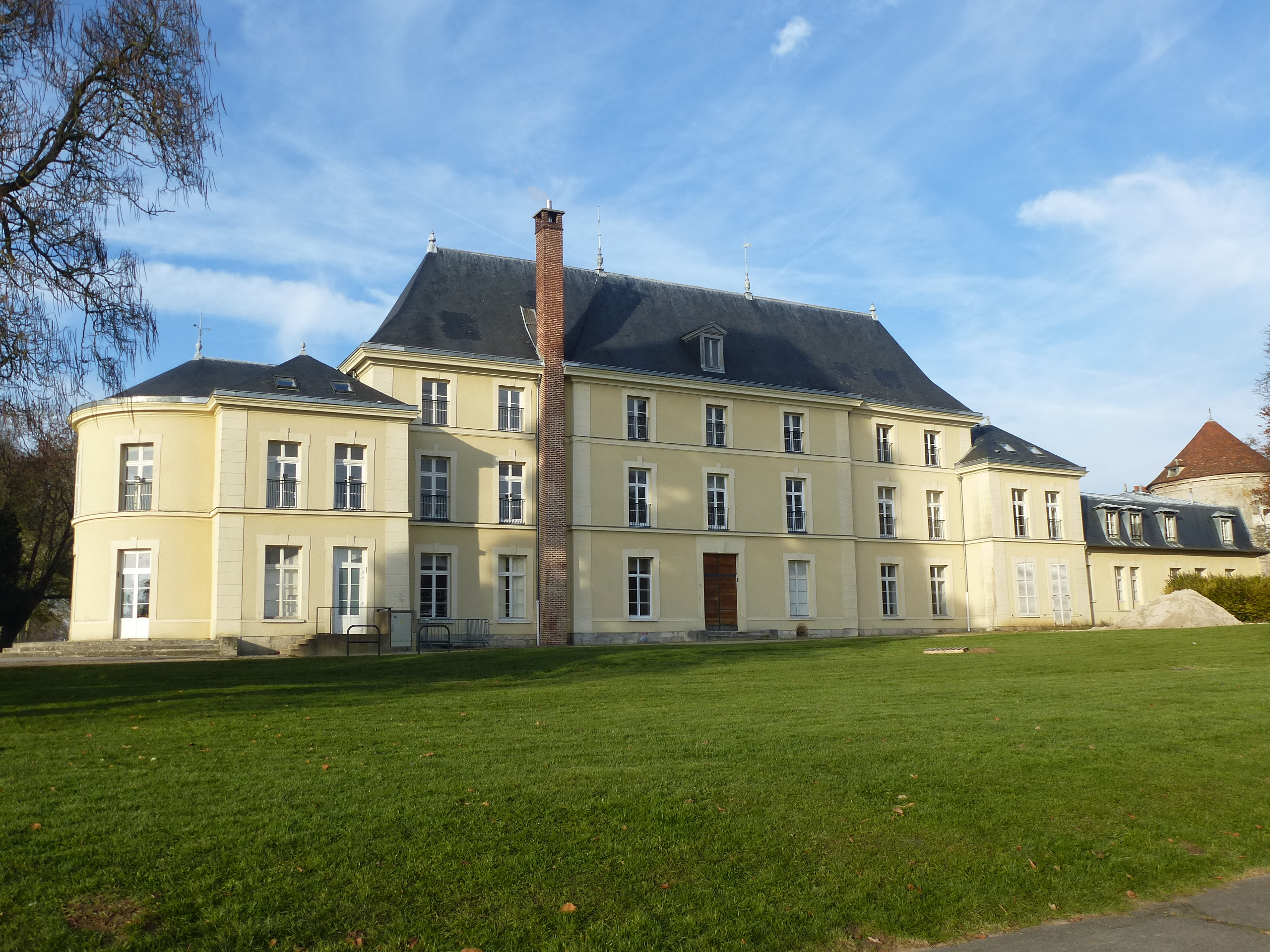 Château de Quincy-Voisins. (Seine-et-Marne, région Île-de-France).